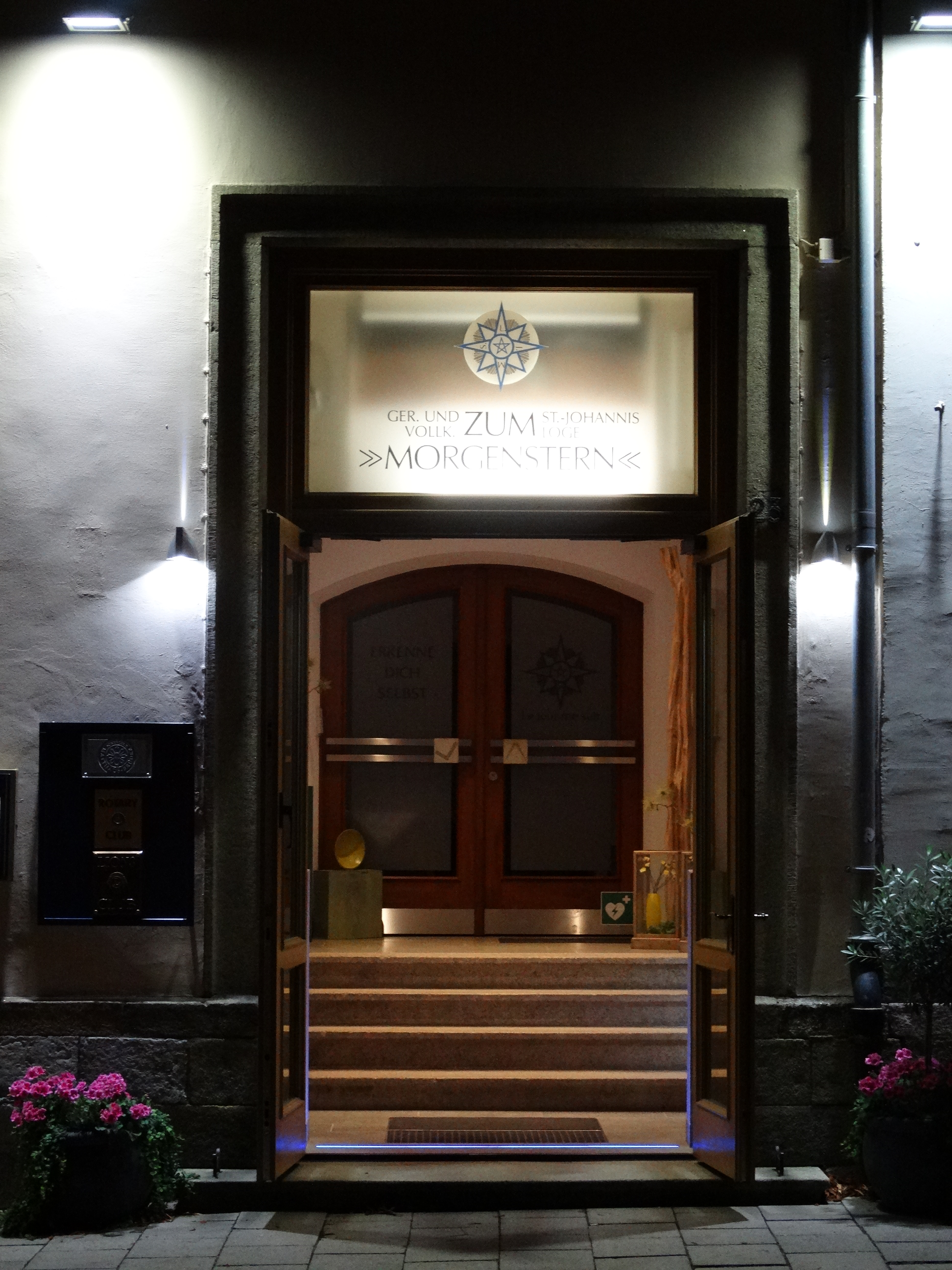 Eingang zur Freimaurer Loge zum Morgenstern in Hof an der Saale